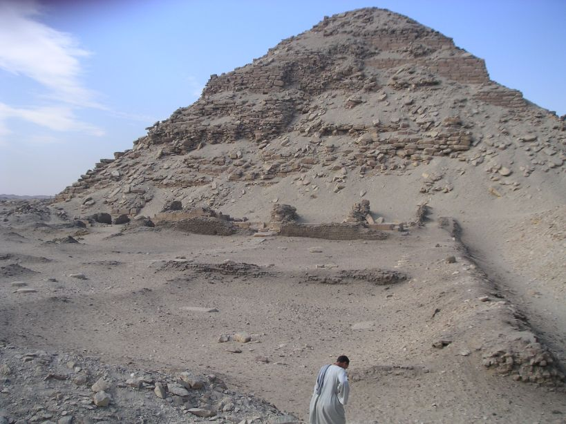 Ruines du temple funéraire et de la pyramide de Néferirkarê à Abousir - Ve dynastie égyptienne